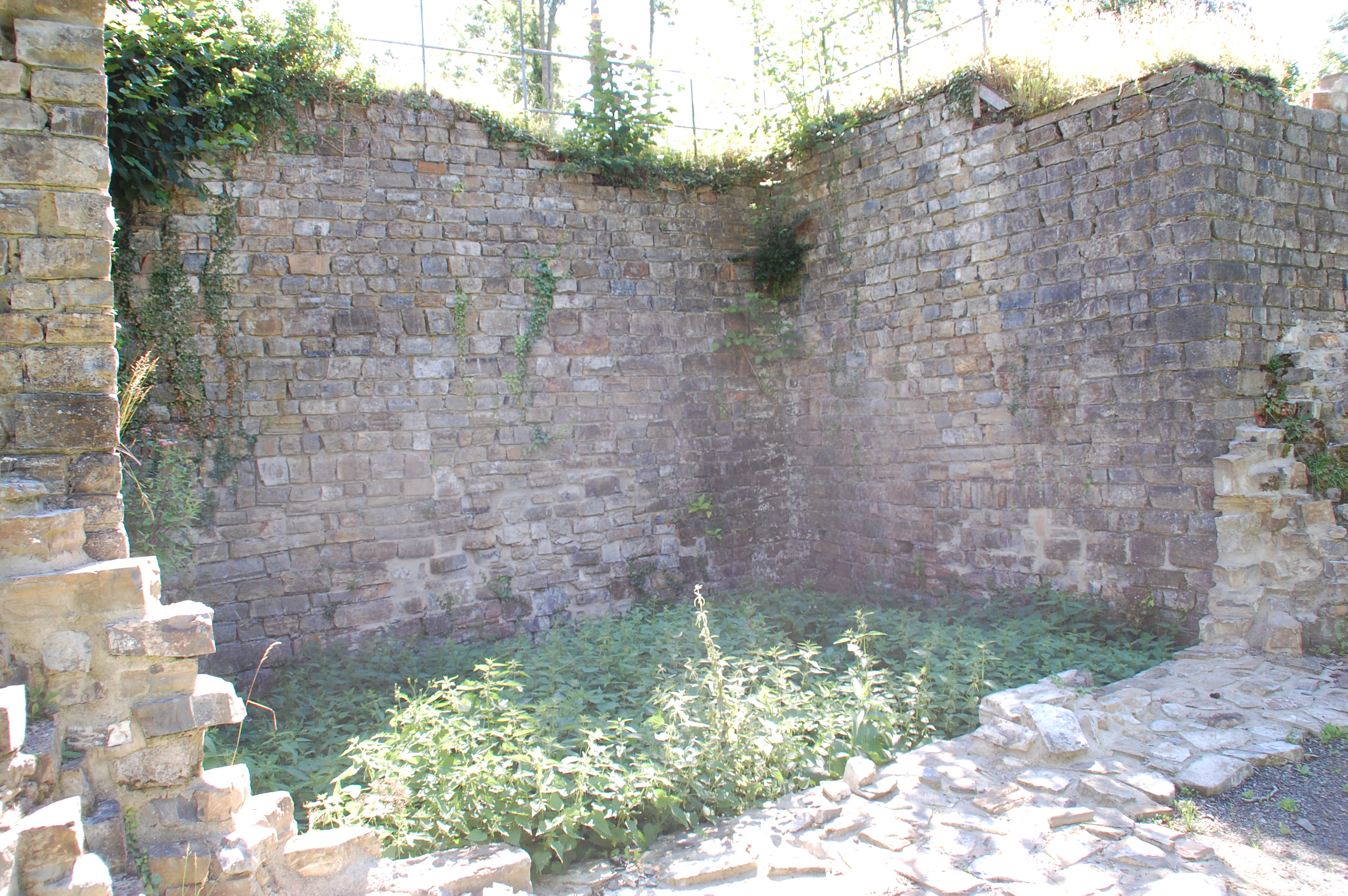 Rüdenburg Arnsberg, Zustand 2016